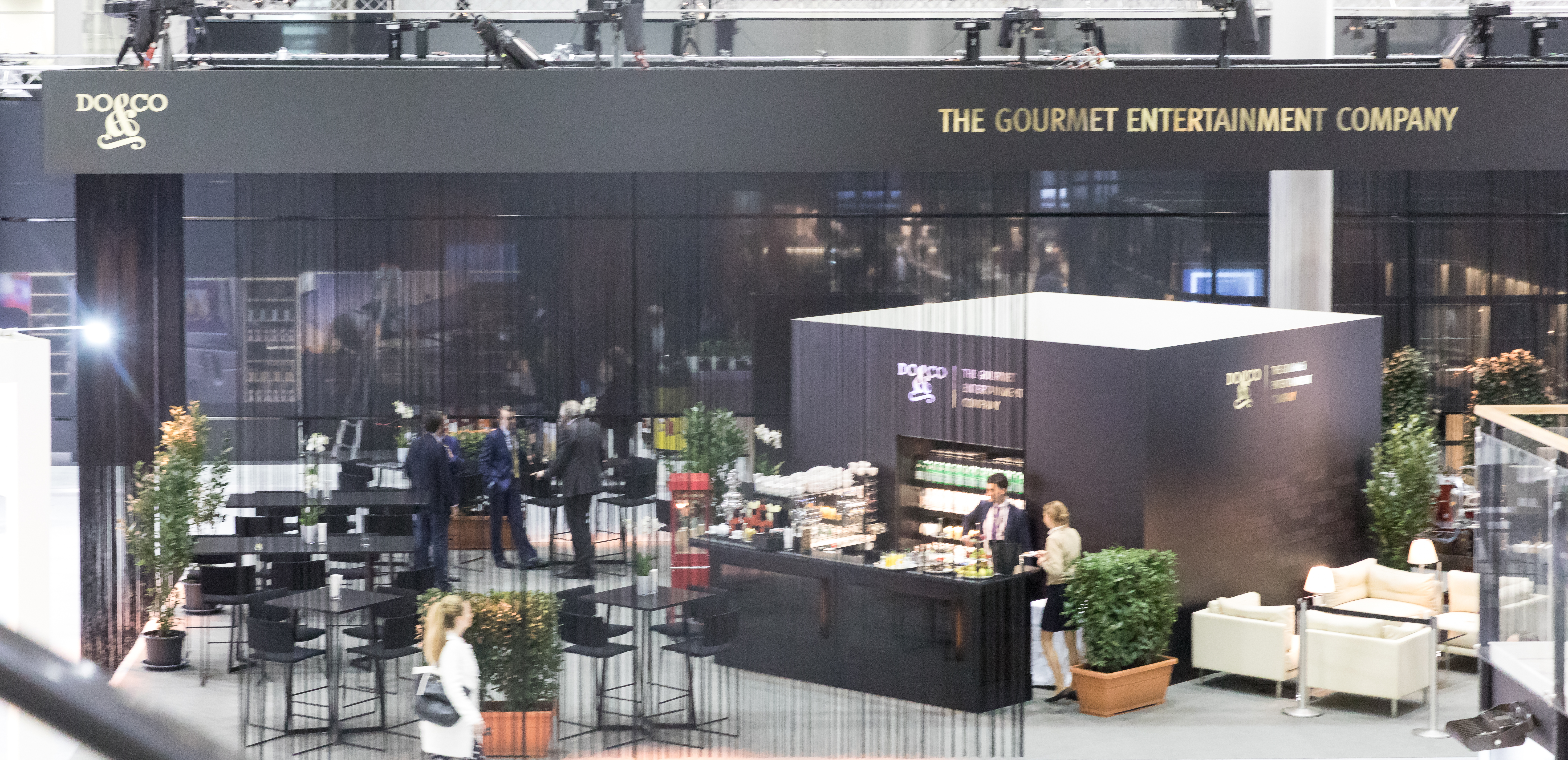 Do&Co